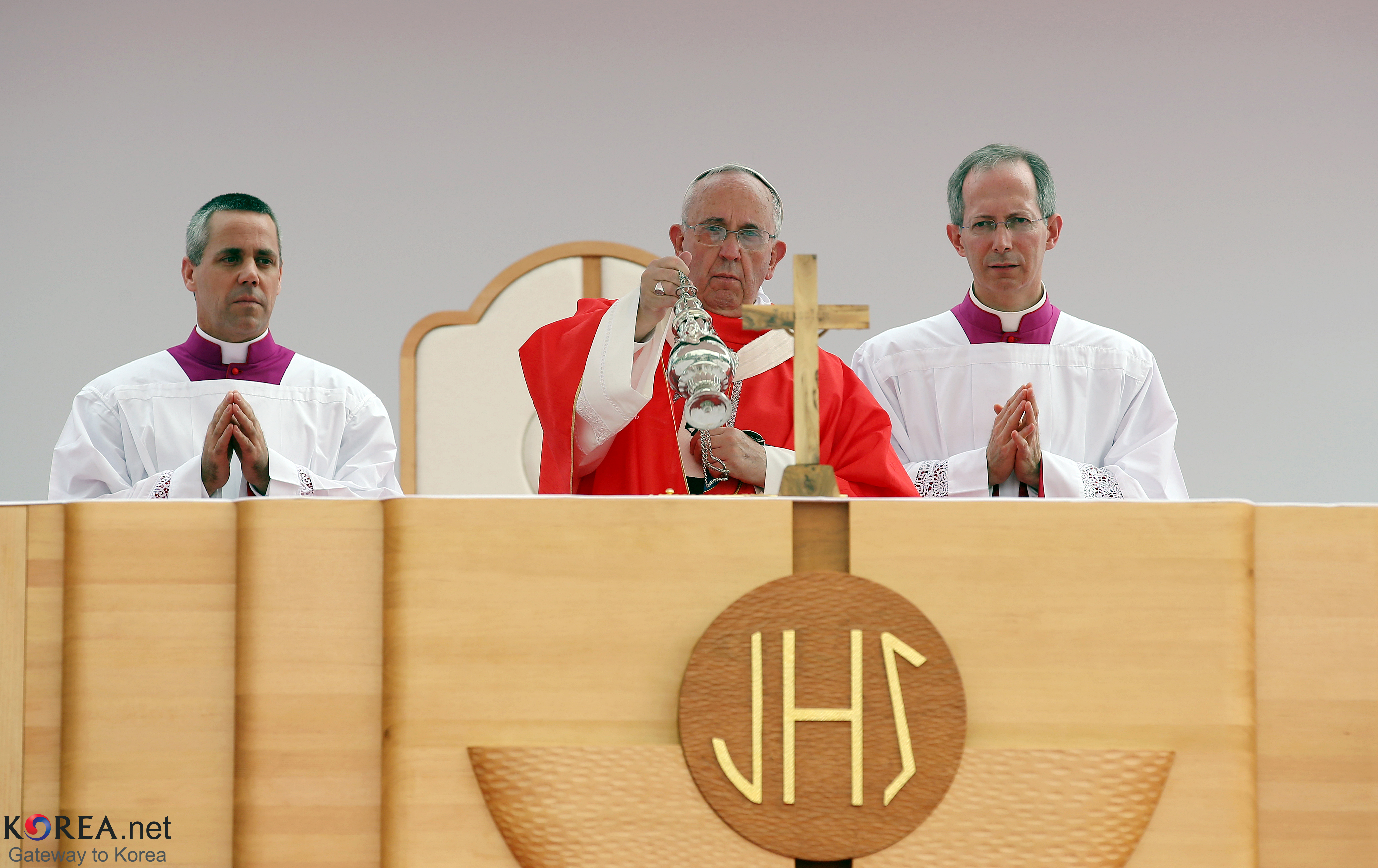 Messe de béatification par le pape François lors de son voyage en Corée du Sud